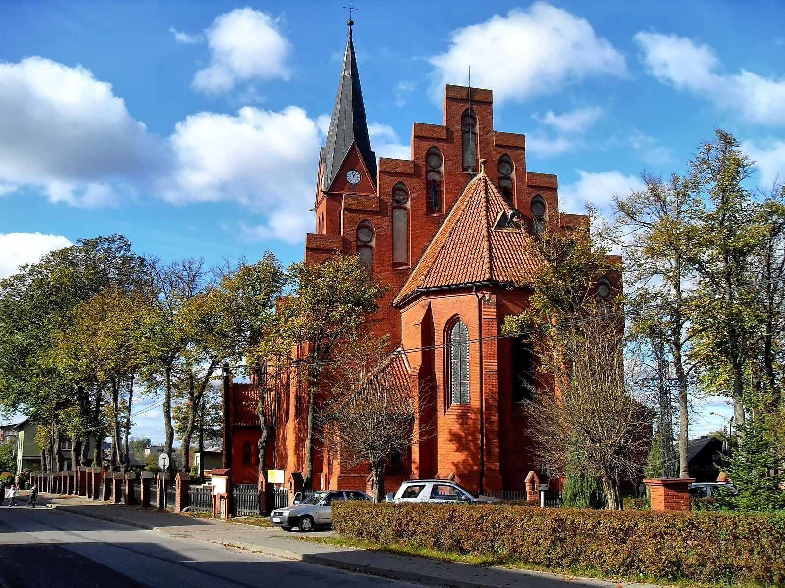 Kościół Narodzenia Najświętszej Maryi Panny w Łęgu.